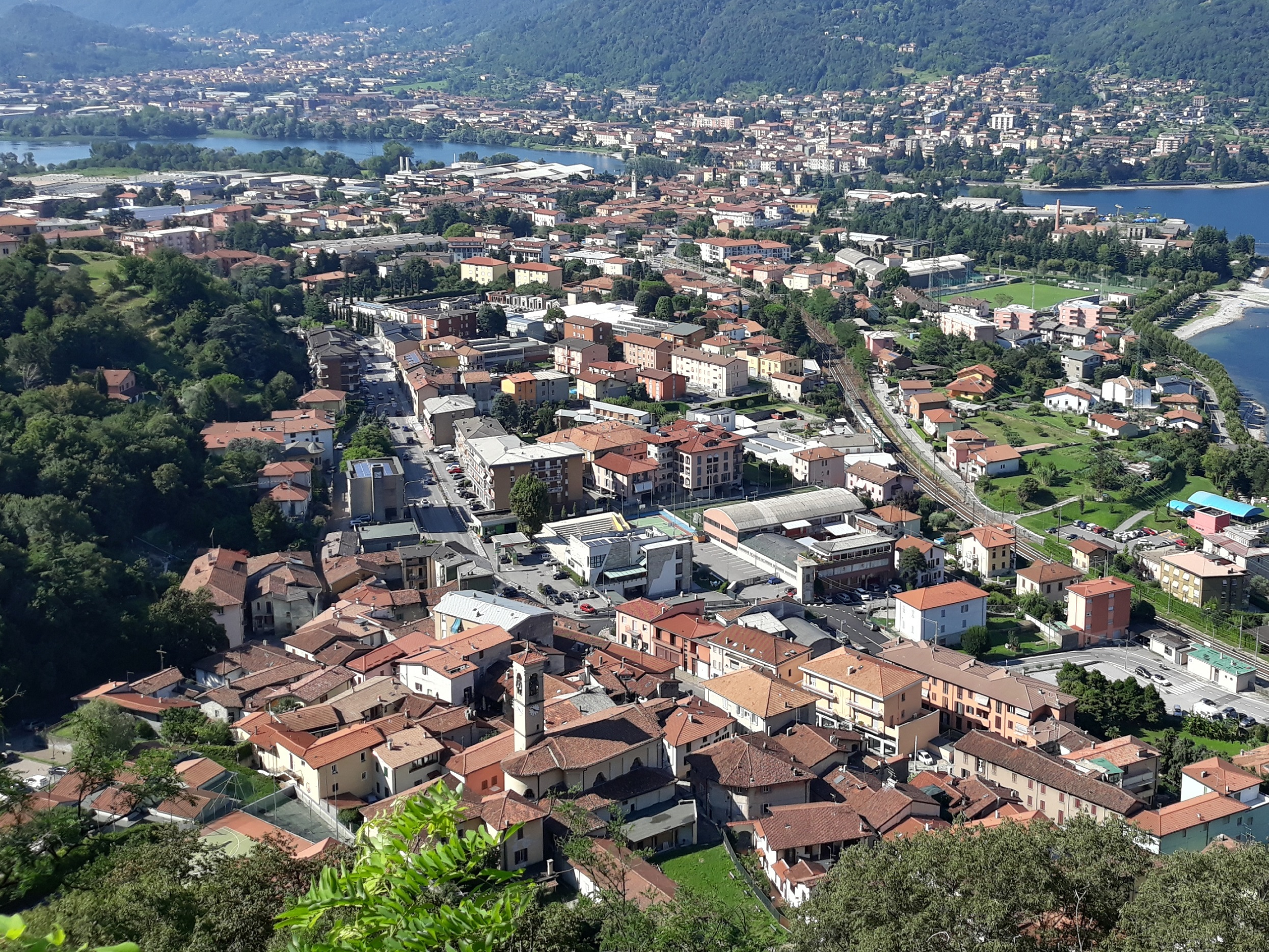 Immagine aggiornata al 2018